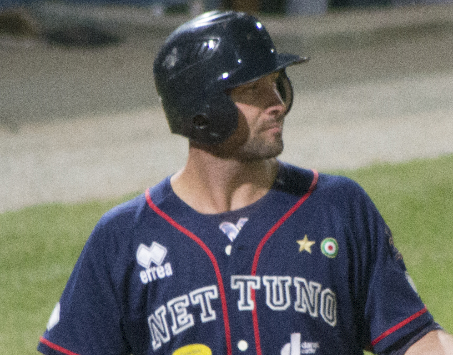 Paolino Ambrosino nella semifinale IBL 2013 disputata tra il Rimini Baseball e il Nettuno.